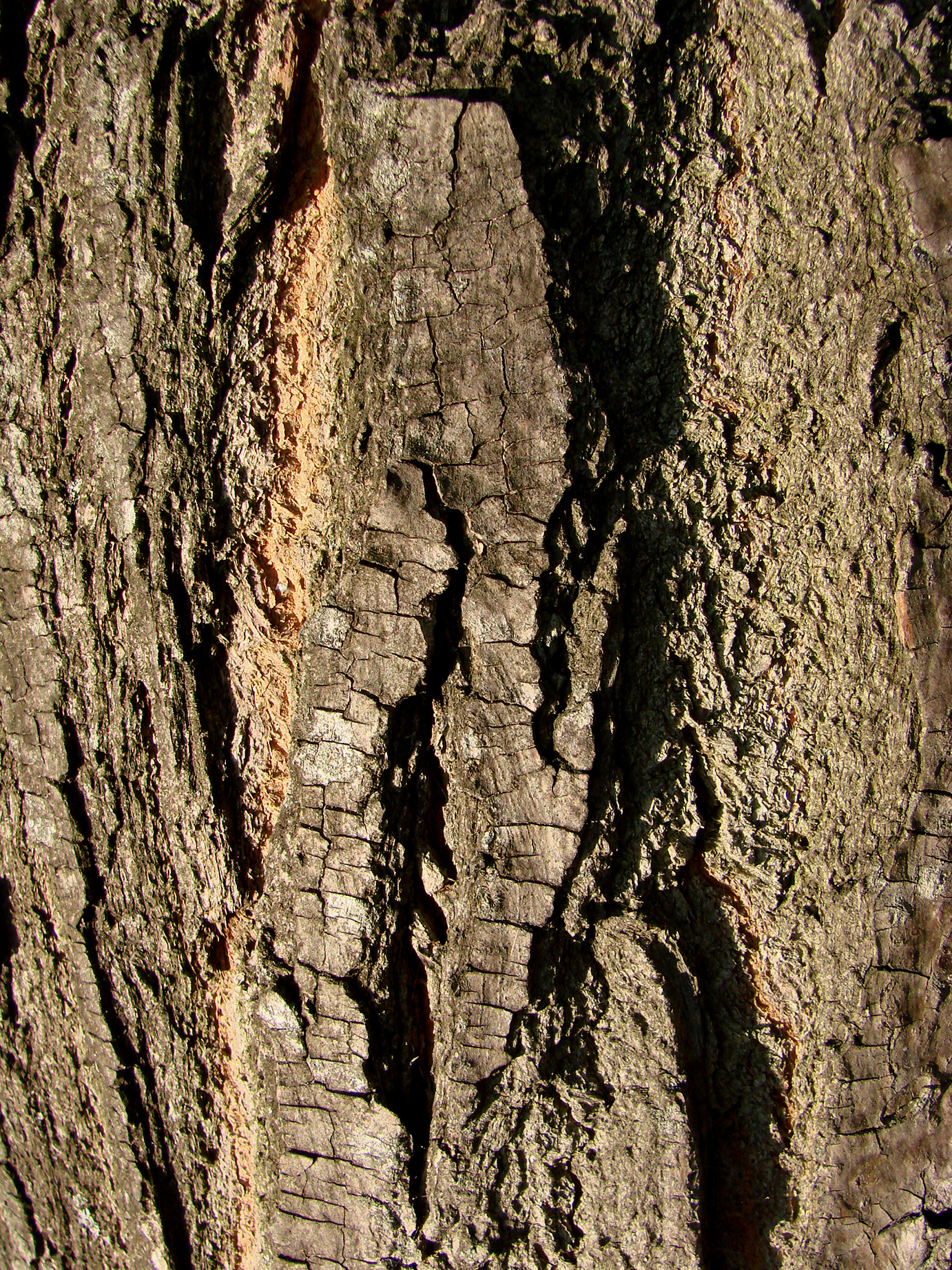 Détail de l'écorce de Melia azedarach au jardin des Plantes de Paris.